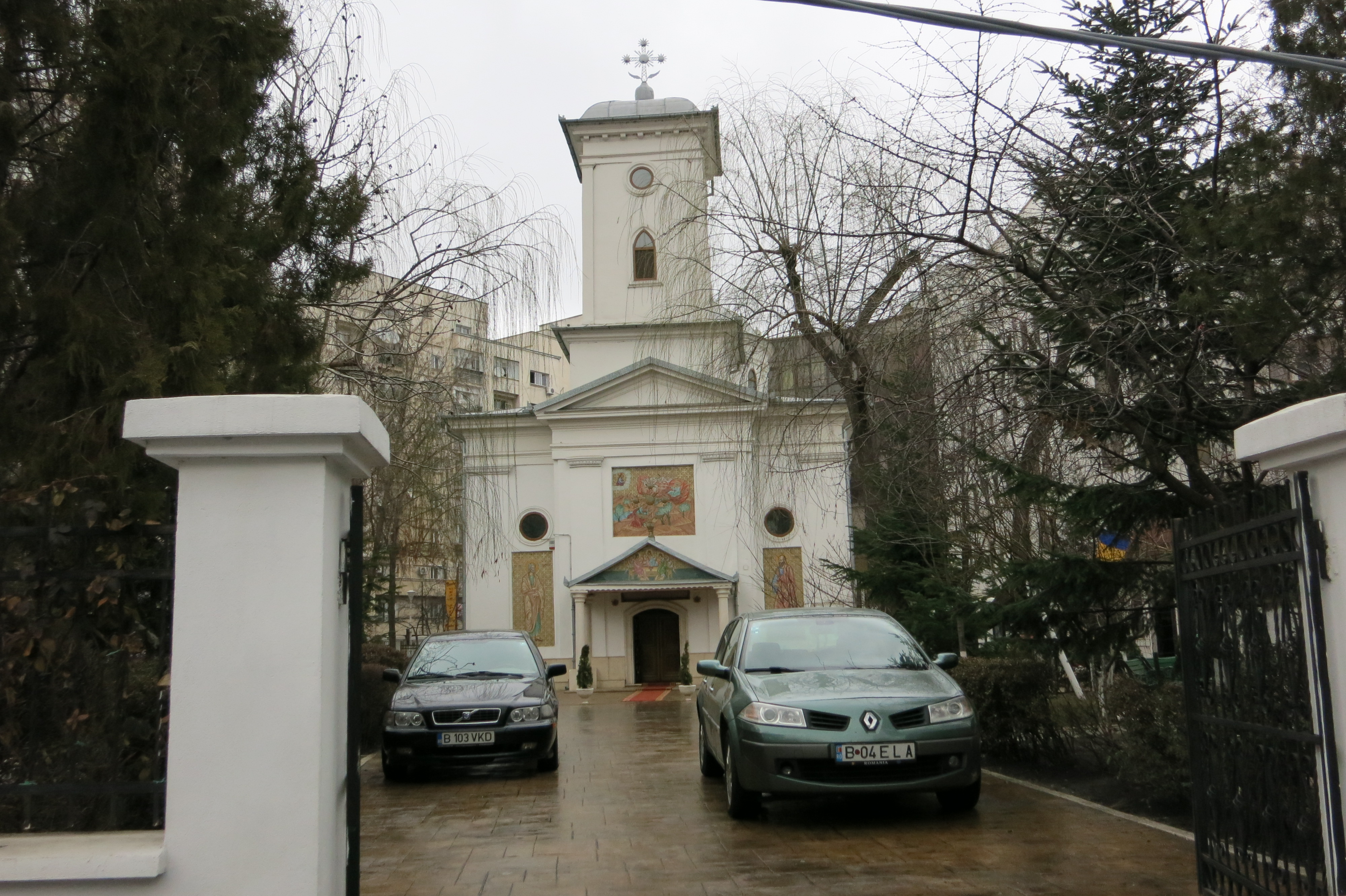 Biserica Sf. Ilie Rahova, în locația cea nouă, unde a fost translatată, în Str. Constantin Silvestru